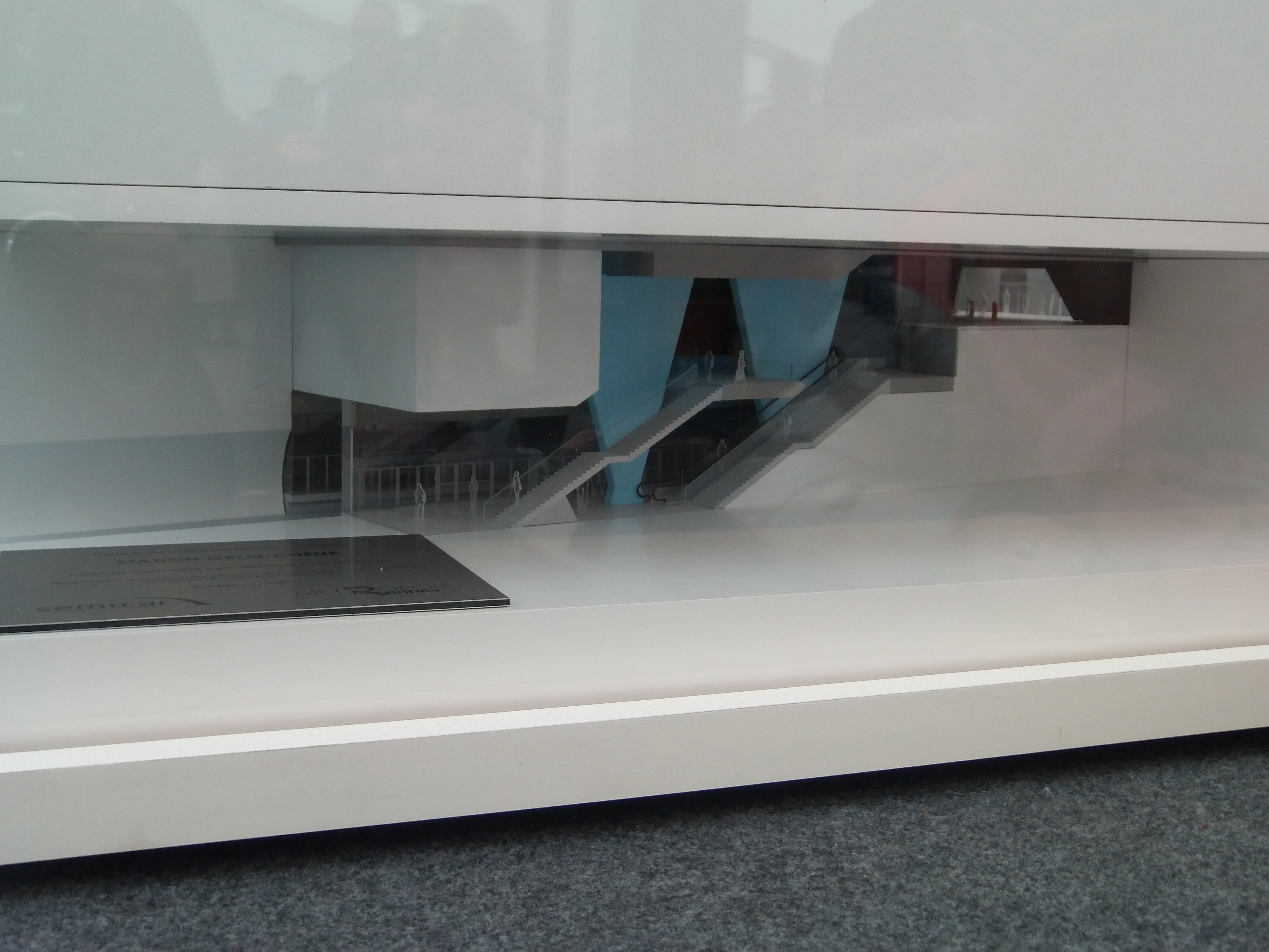 Visite du chantier du tunnelier de la ligne B du métro de Rennes le 22 décembre 2014. Maquette de la station Gros Chêne.